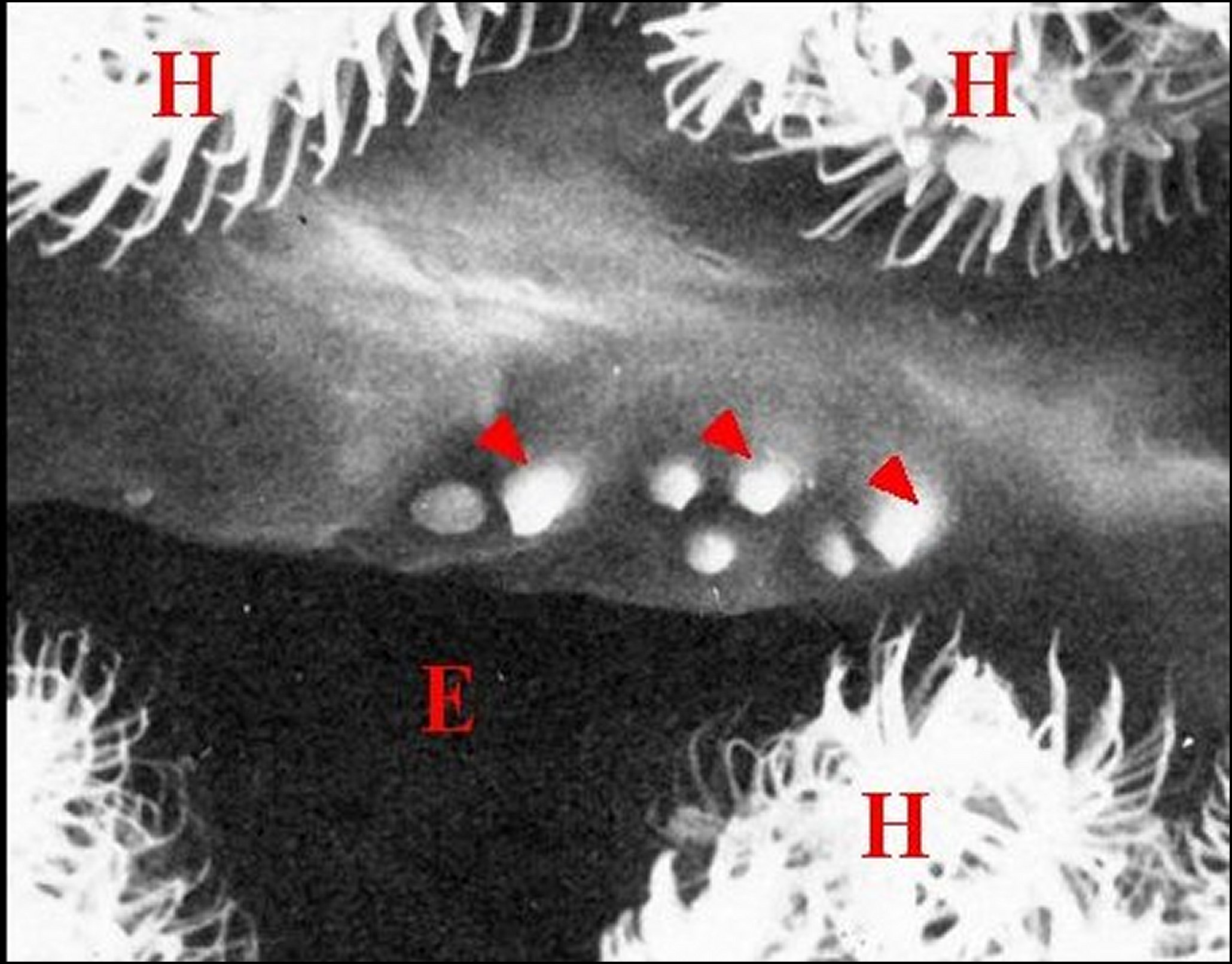 Papilles dans un champ gonoporal d' Alopecosa fabrilis vues au microscope électronique à balayage.